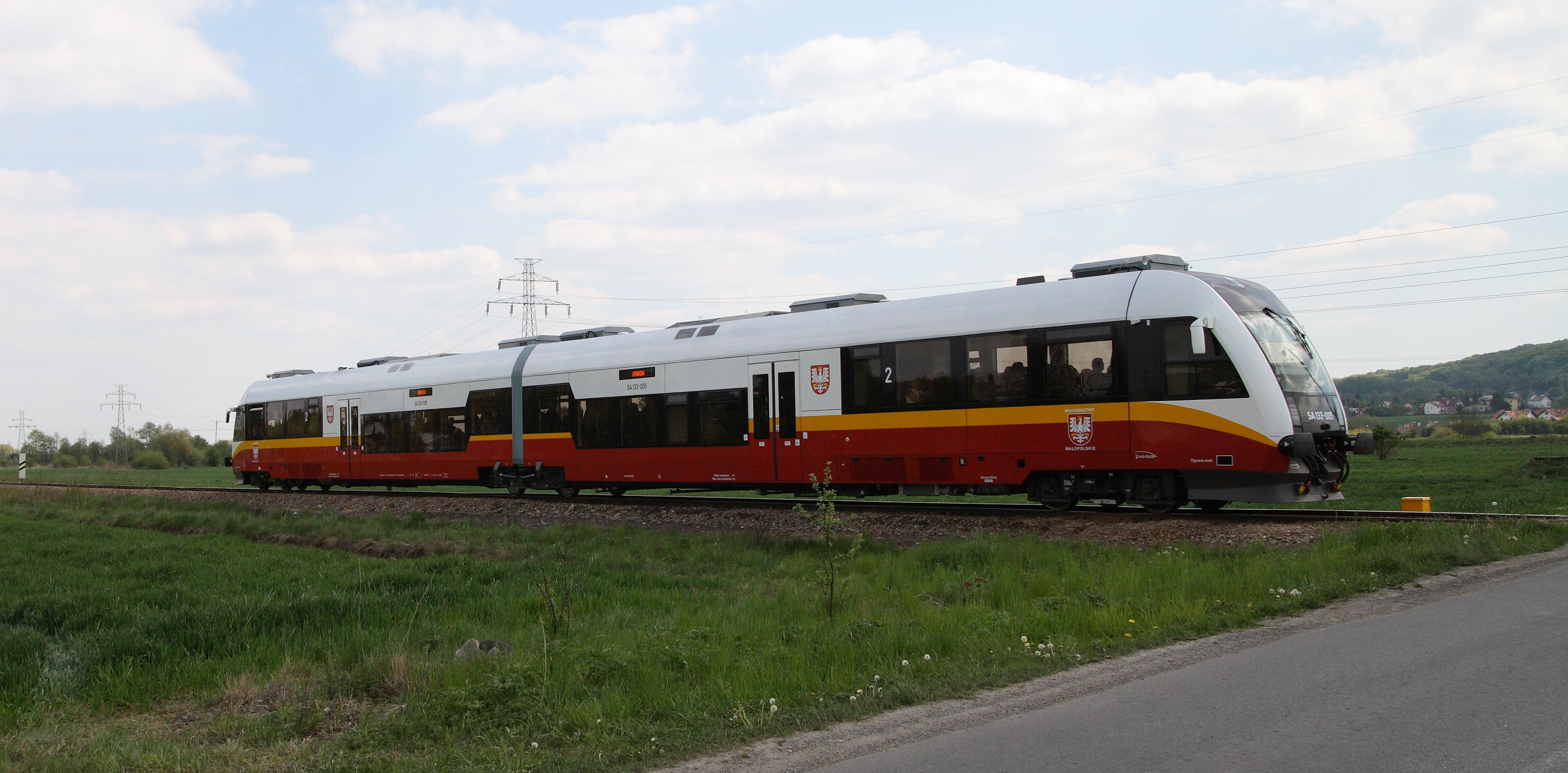 Szynobus SA133-005 na trasie z Balic do Krakowa w okolicach Mydlnik.